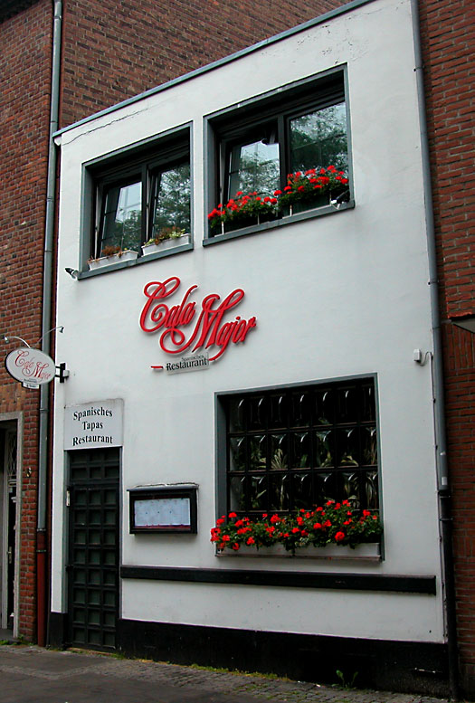 Restaurant in 2008, Akademiestraße 18, Düsseldorf-Altstadt